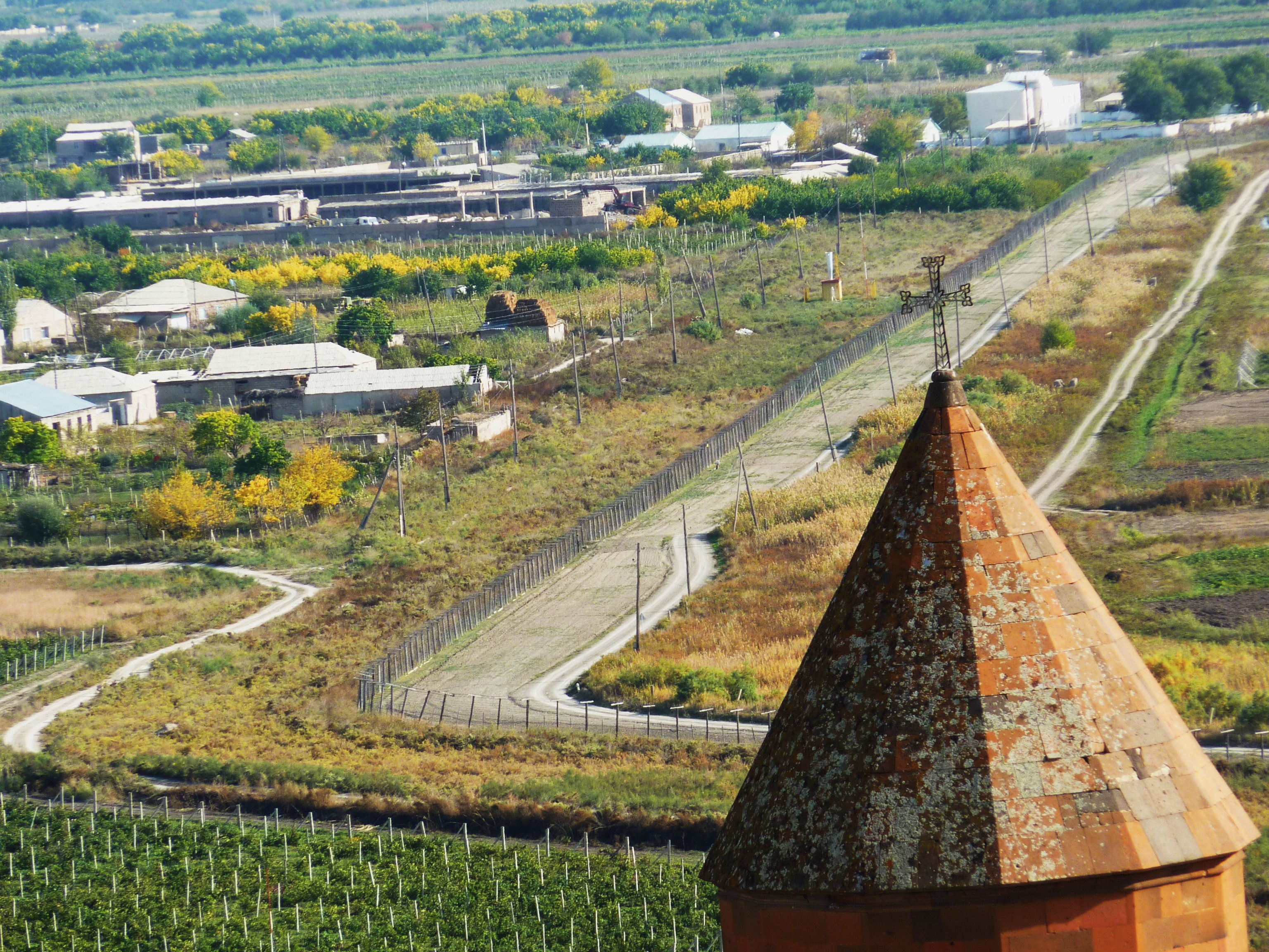 Le no-man's-land frontalier avec la Turquie et ses barbelés vu du monastère de Khor Virap